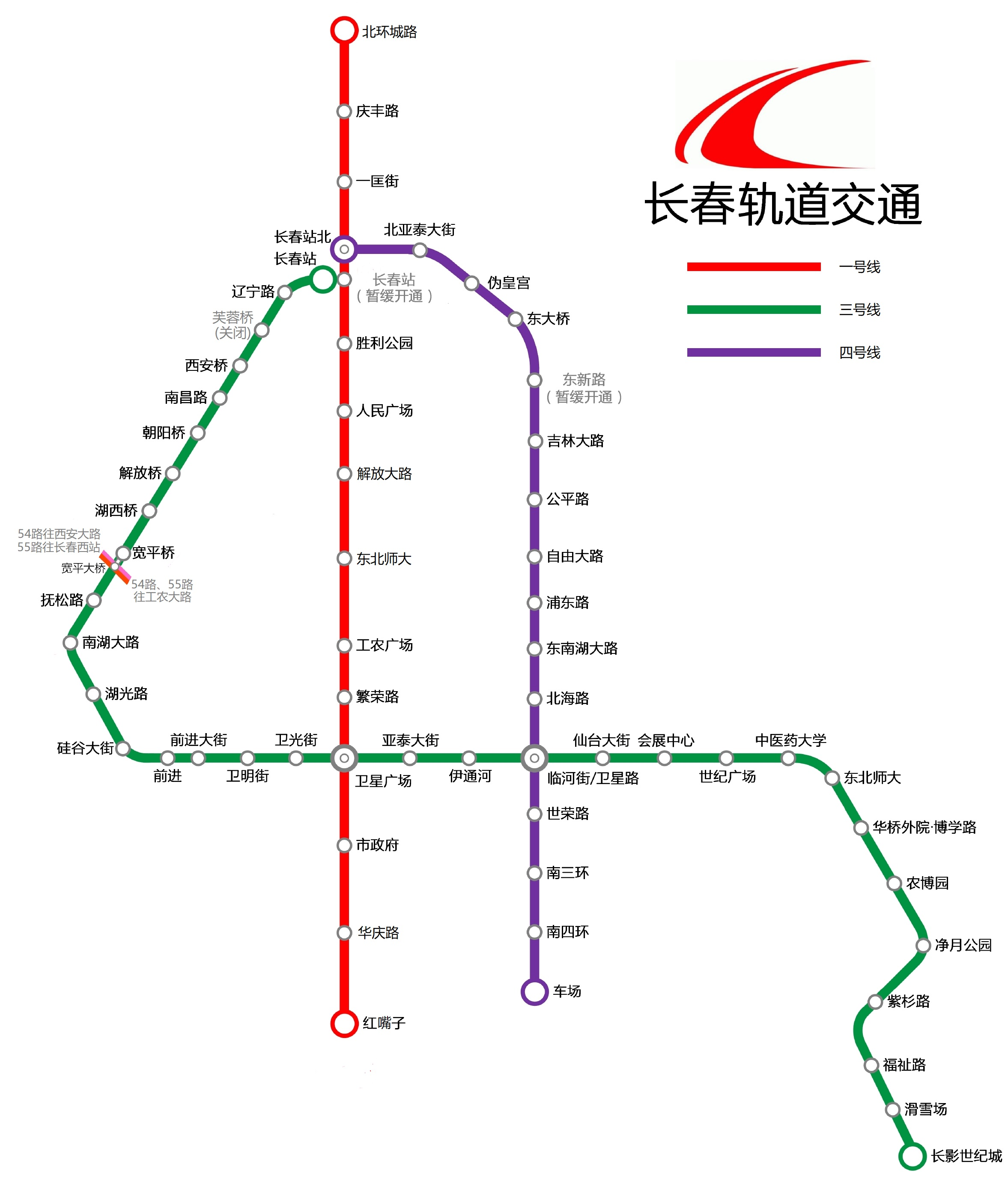 截至20171213的长春轨道交通线路图，其中卫星广场和长春站北未开放站内换乘。